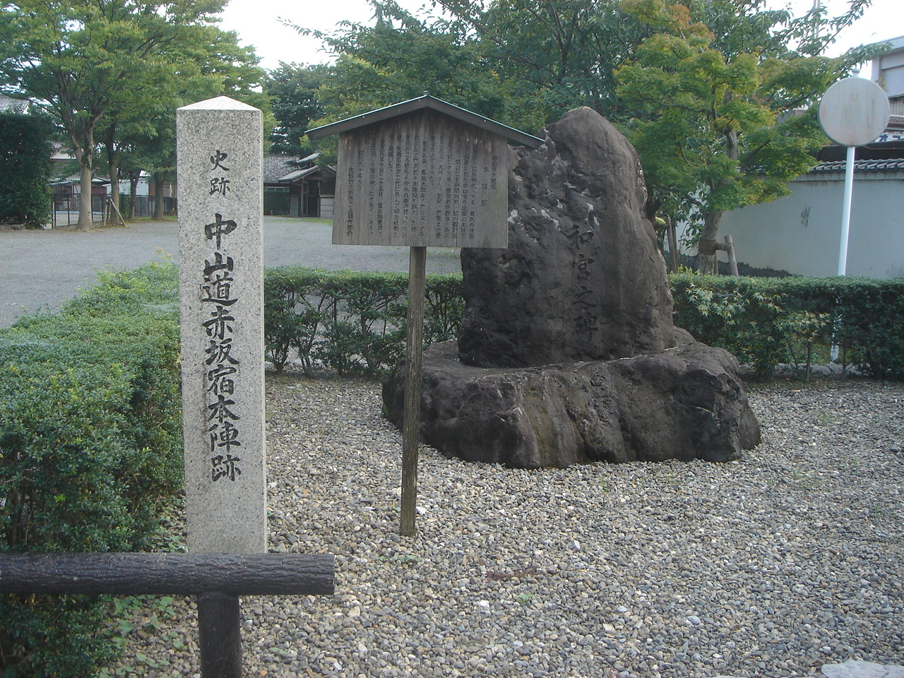 Nakasendo Akasaka-jyuku(中山道 赤坂宿、本陣跡),Ogaki,Gifu,Japan(岐阜県大垣市)で撮影